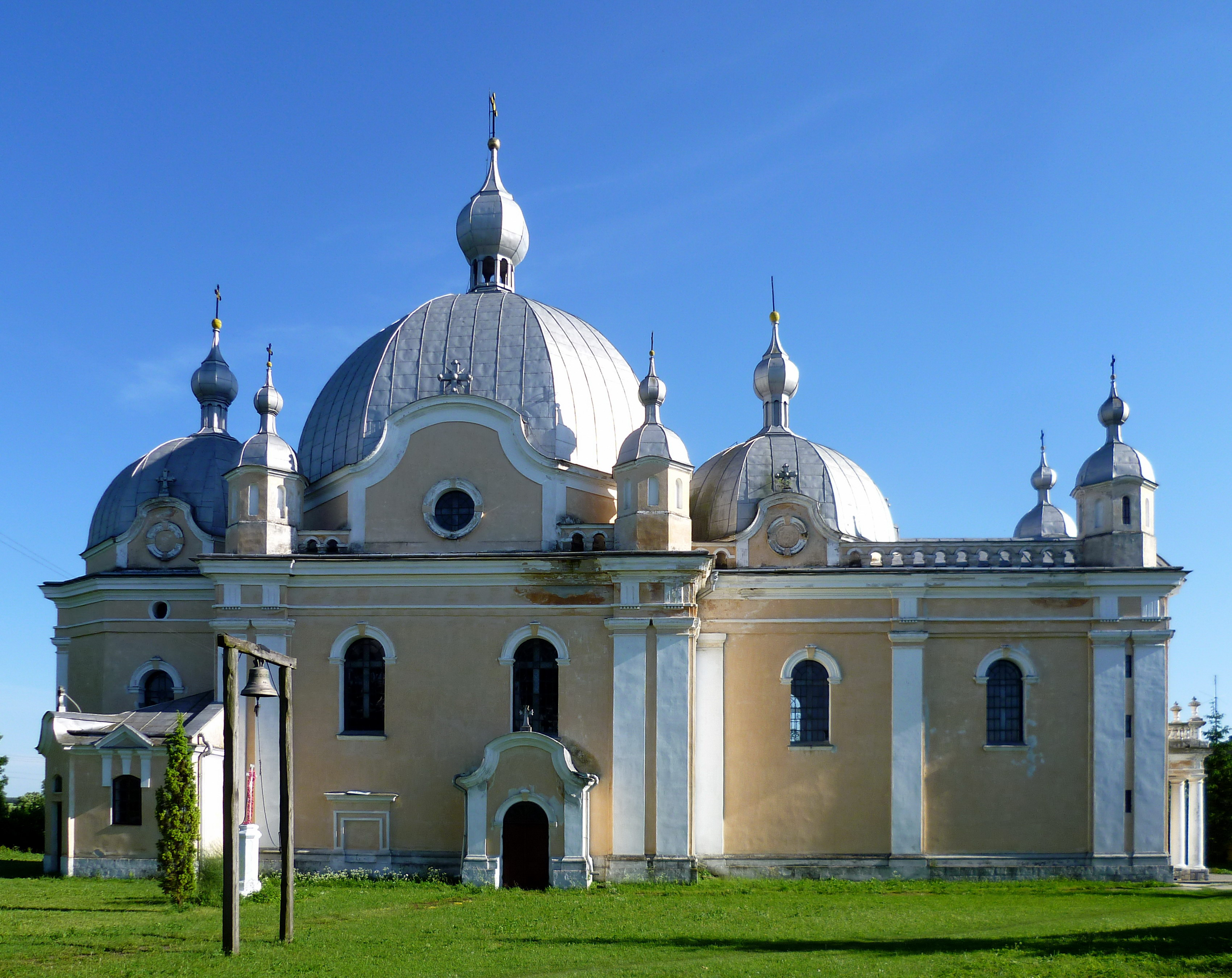 Церква Різдва Богородиці (1854-57 рр.) - вигляд з півночі - в м.Угневі (вул.Валова, 7) Сокальського району Львівської області України